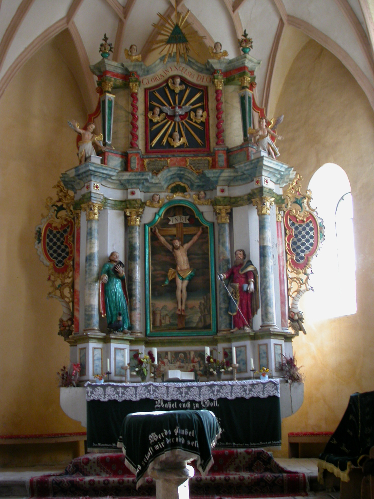 Ansamblul bisericii evanghelice fortificate, sec. XIV - XVI